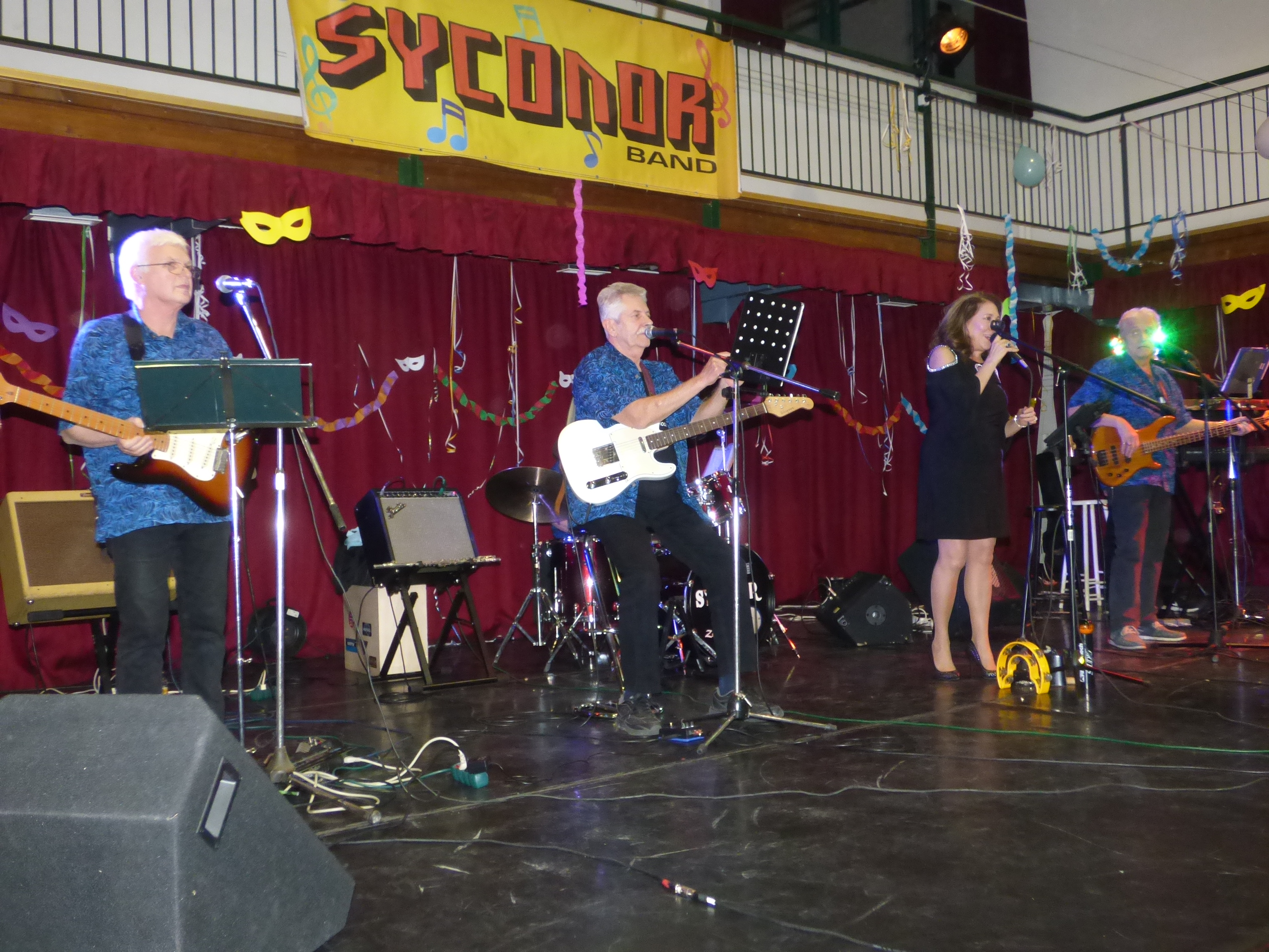 A Syconor együttes egy 2019-es farsangi rendezvényen Pilisszentivánon [Dobos István (szólógitár), Hauer Rezső (dobok), Fábián Attila (ritmusgitár), Somlai Róbert (basszusgitár), Kosztolányi Attila (billentyűk), Catherine Conley Jakobs (ének)]